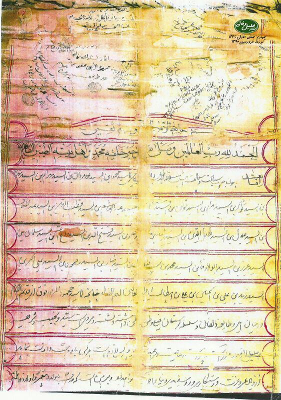 شجره-نامه-سادات-ابوالوفاء-کوهدشت-عکس-12